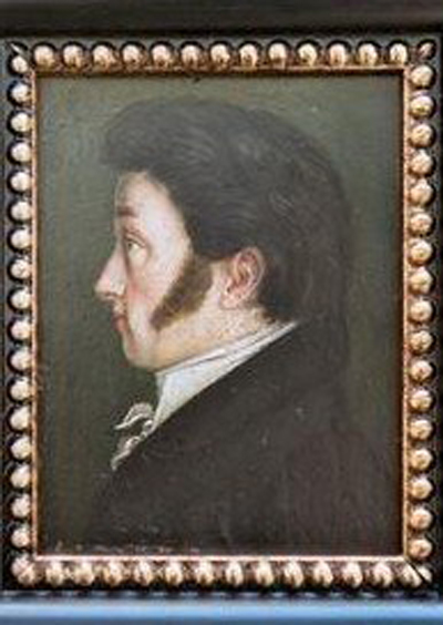 Peter Eduard Bolzano (1794-1818), Arzt in Prag. Dieses kleine Ölbild hat die Maße 9 x 14 Zentimeter.